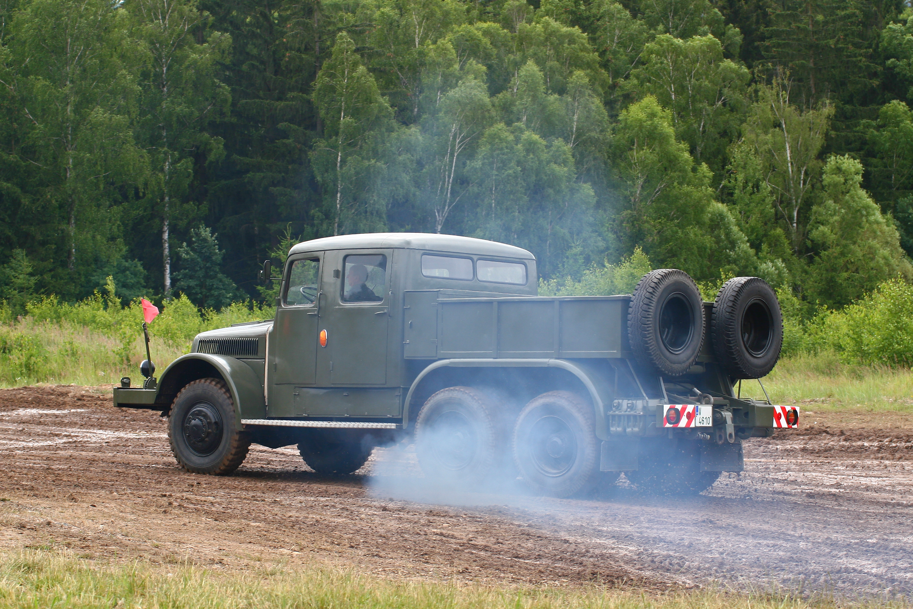 Vojenská technika zaznamenaná při dynamických ukázkách na Dni pozemního vojska BAHNA 2018, který pořádá Velitel společných sil a Nadace pozemního vojska AČR.